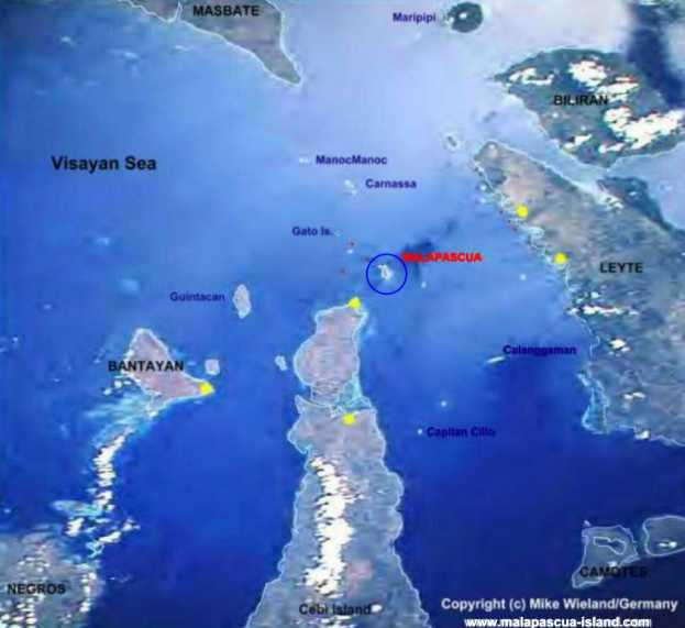 Dieses Foto ist von der NASA aus einer Raumsonde fotografiert und freigegeben. Bearbeitet (Lichtaufhellung und Konturen usw.)von Mike Wieland